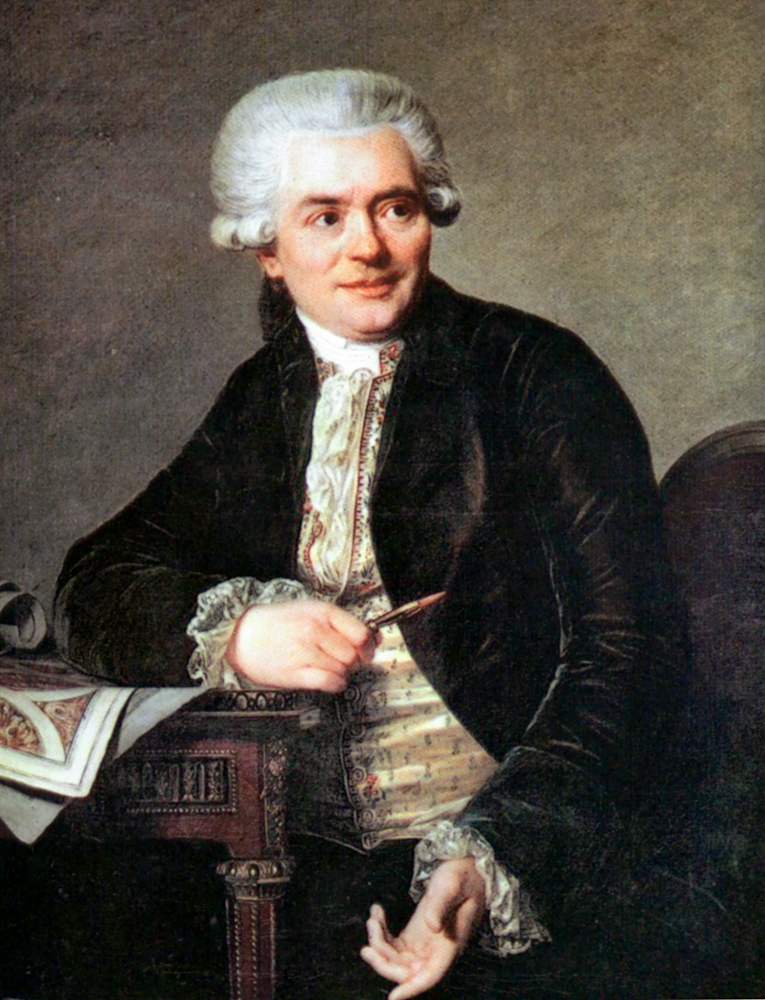 Johann Heinrich Riesener (1734-1806); Möbeltischner Bild wurde aus den Bildern Bild:Riesener.jpg und File:Johann Heinrich Riesener.jpg von User:ArtMechanic zusammengeführt & bearbeitet.